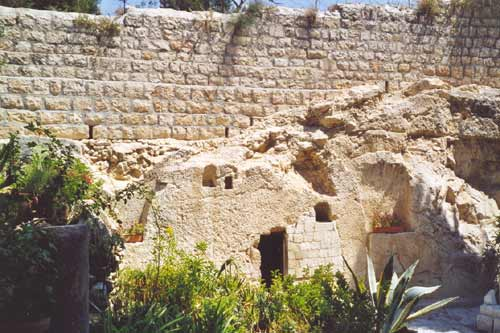 Gartengrab in Jerusalem fotografiert am 09.08.2001 *Quelle:selbst fotografiert